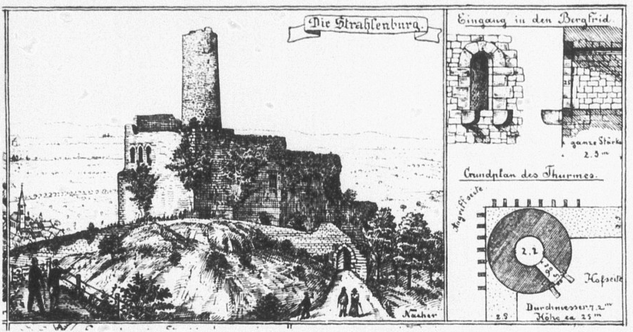 Strahlenburg Schriesheim